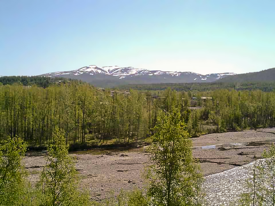 Хасынский район, окрестности райцентра